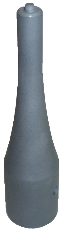 Schaubild einer Sonotrode in kathenoidaler Form mit Nietgeometrie